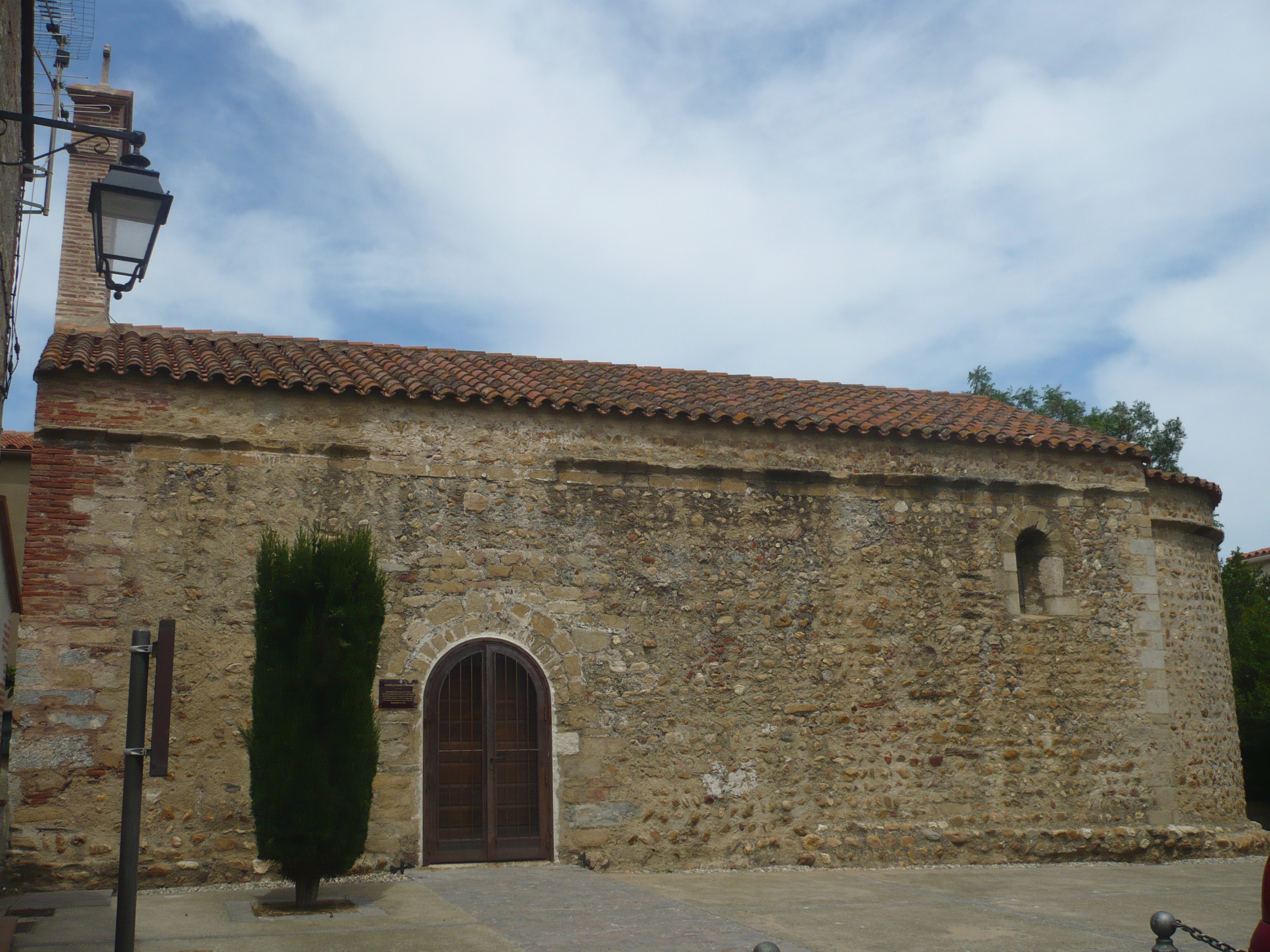 Vue générale de la chapelle Saint-Etienne à Saleilles